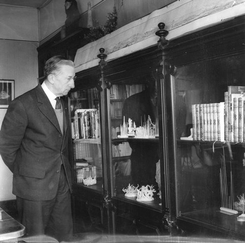 Norbert Casteret admirant sa collection de concrétions.